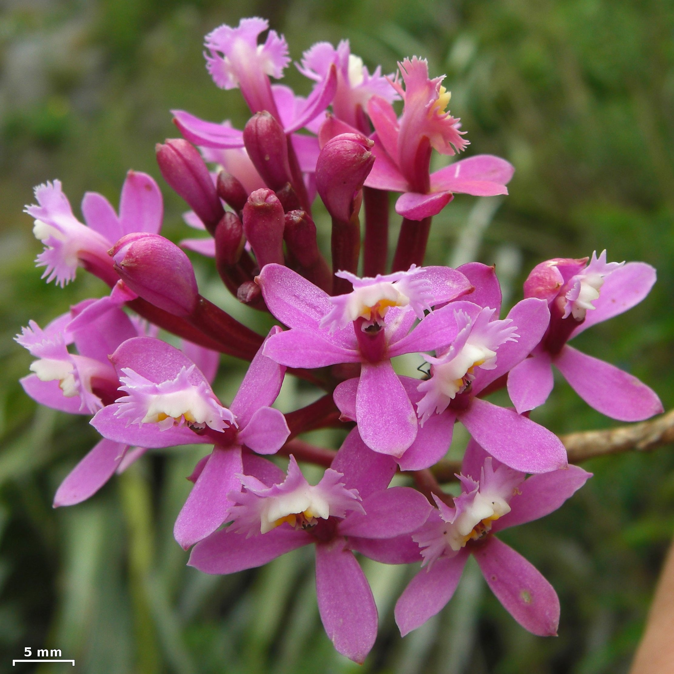 Ollantaytambo, Peru, 20130121